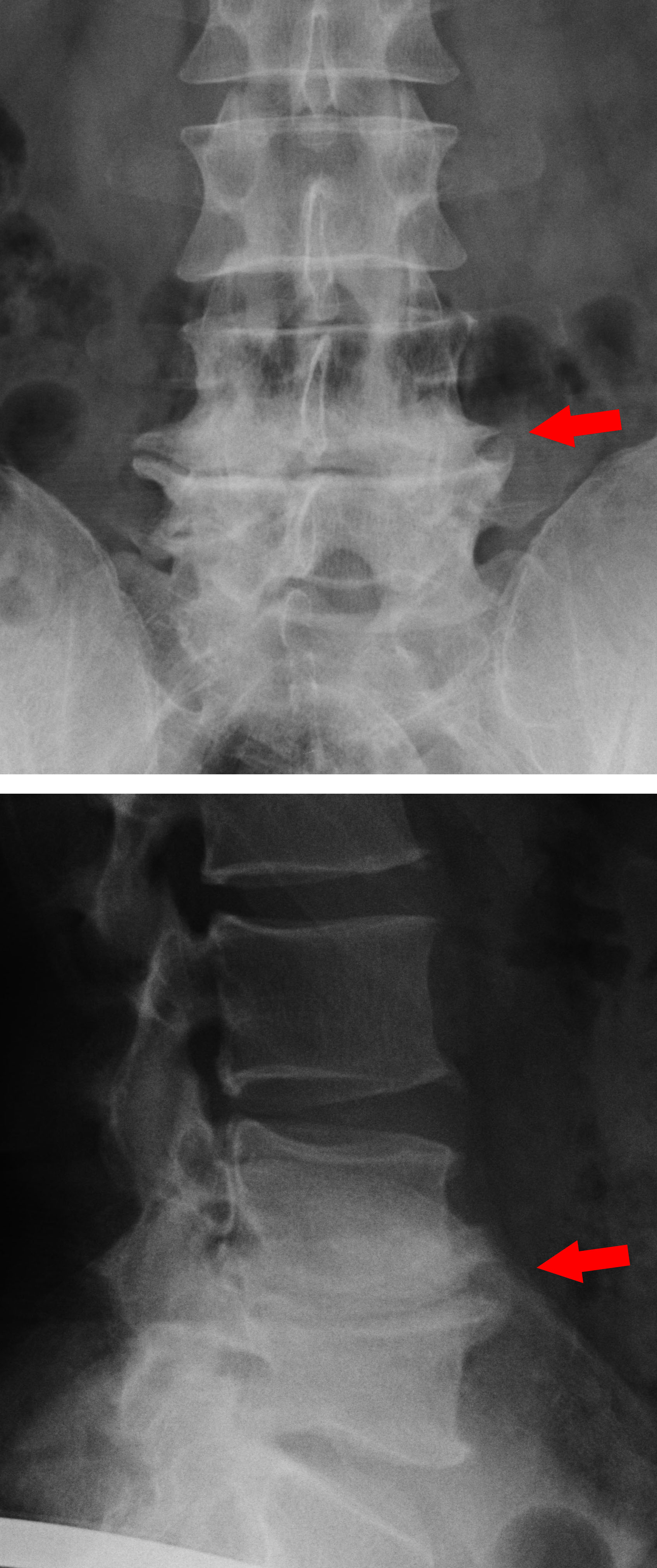 Osteochondrose L4/5